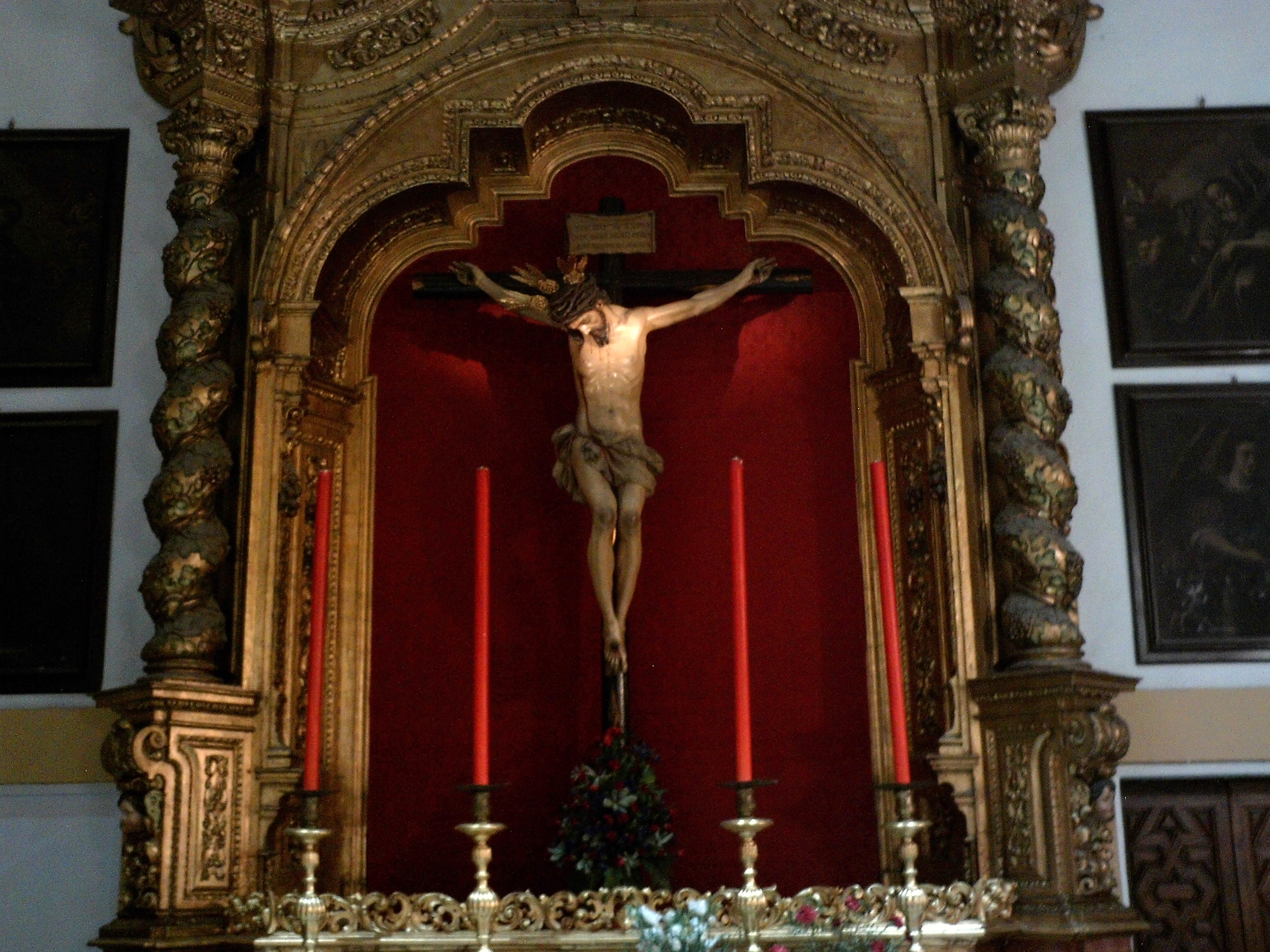 Cristo de la Salud. Iglesia de San Bernardo. Sevilla, Andalucía, España.